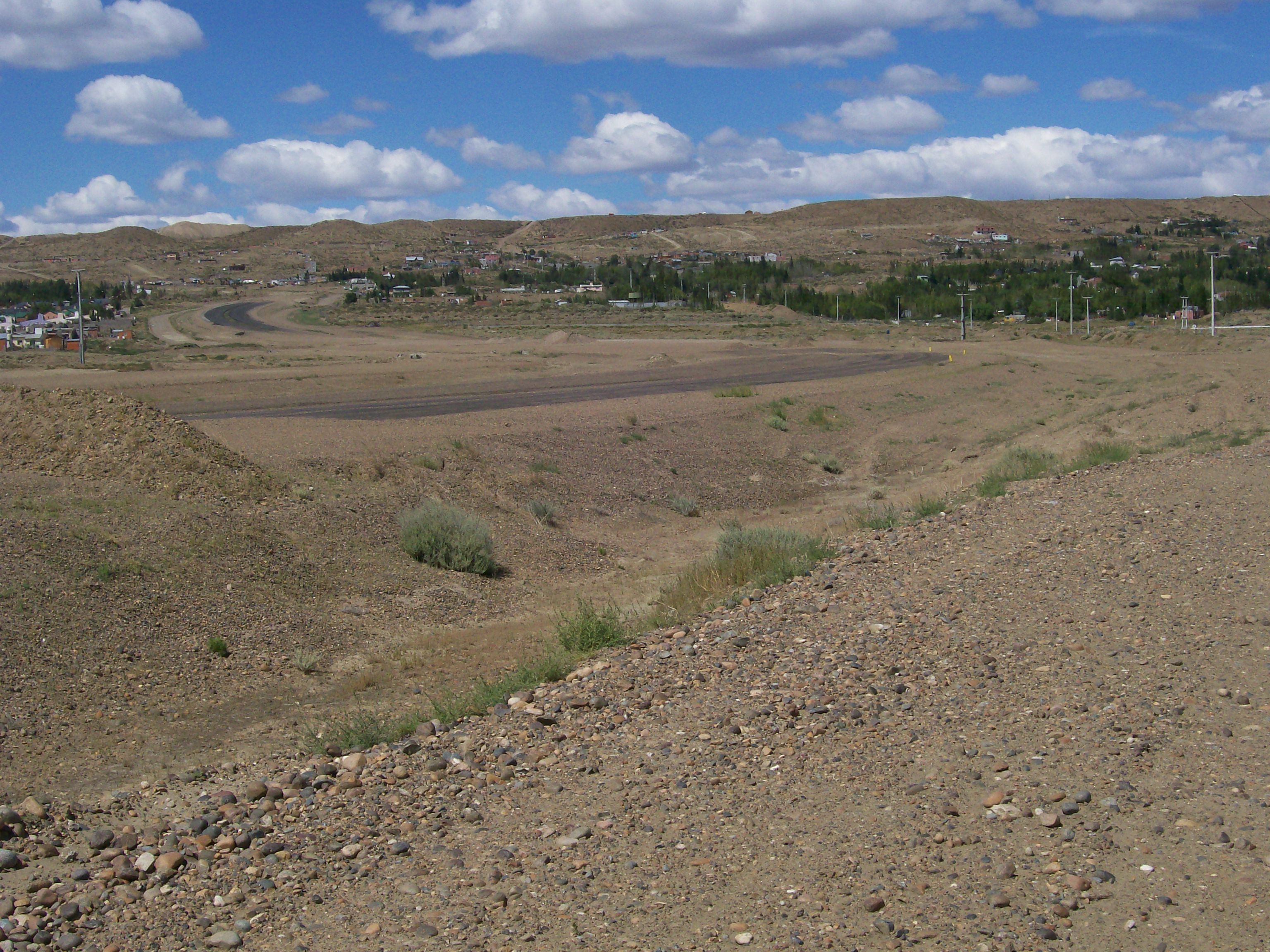 vista a la circunvalacion